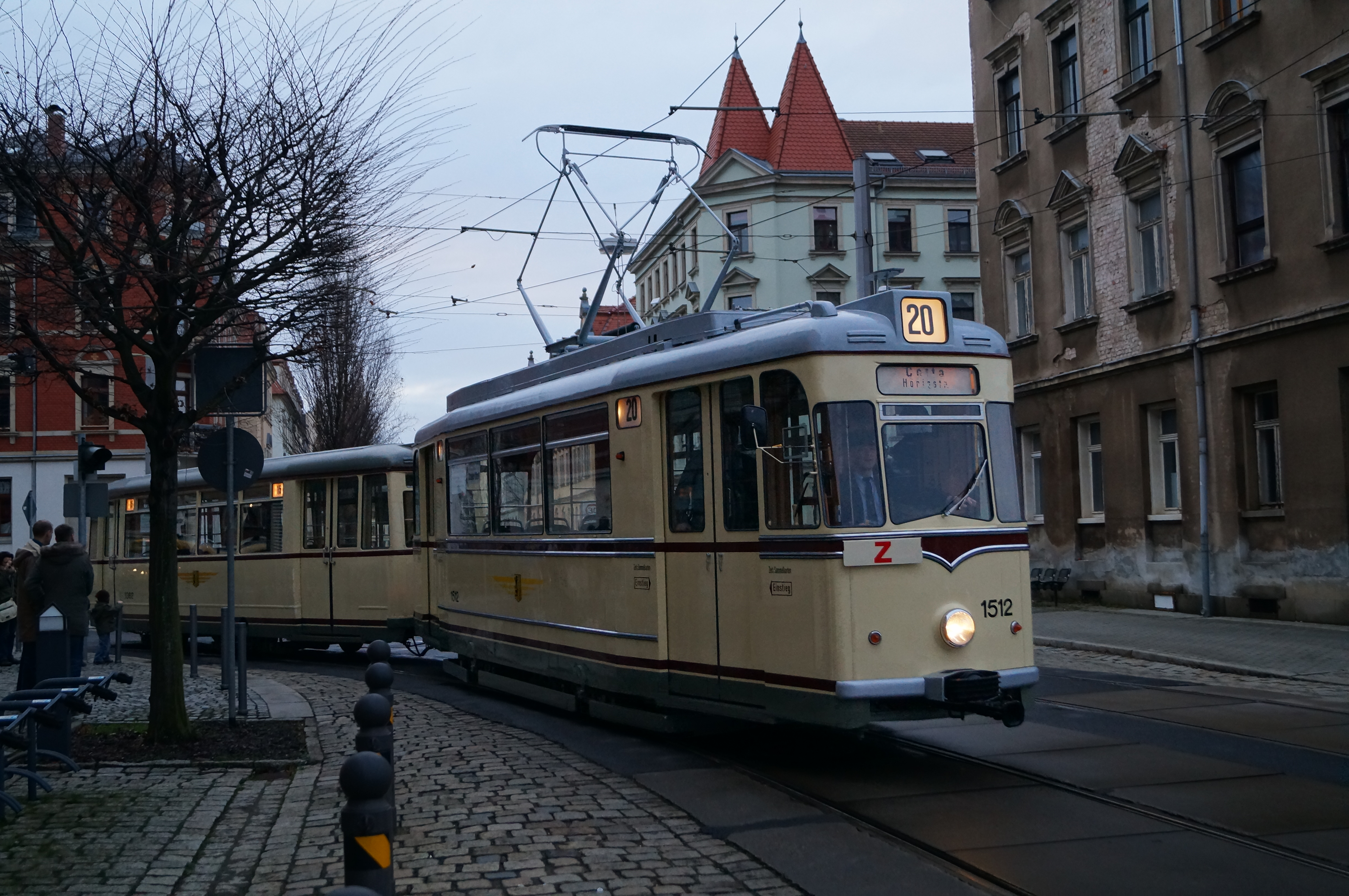 Gotha-Wagen 1512 am Betriebshof Trachenberge in Dresden